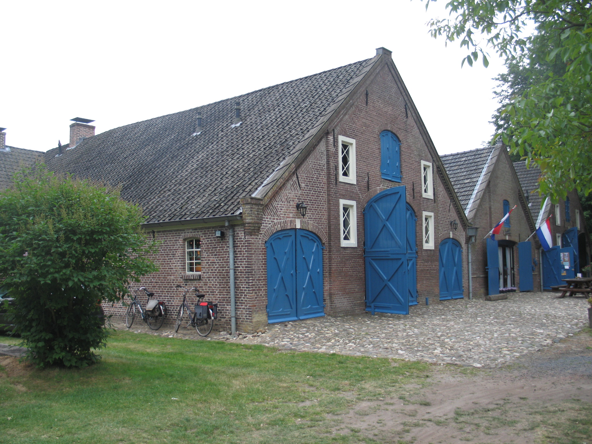 Rijksmonument in Renkum Everwijnsgoed, Bennekomseweg 160